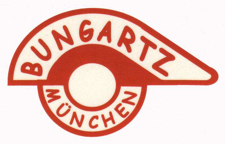 Firmenzeichen Bungartz &. Co München (1934 gegründet, 1976 von Gutbrod übernommen); bei dieser Version handelt es sich vermutlich um einen Prospektscan